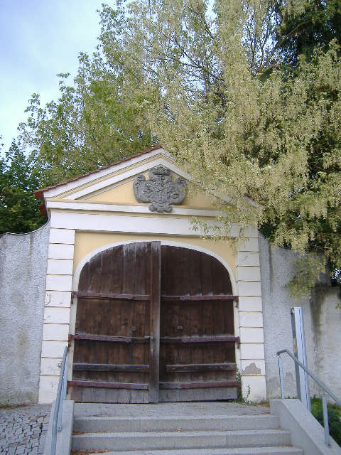 Schloss Reimlingen